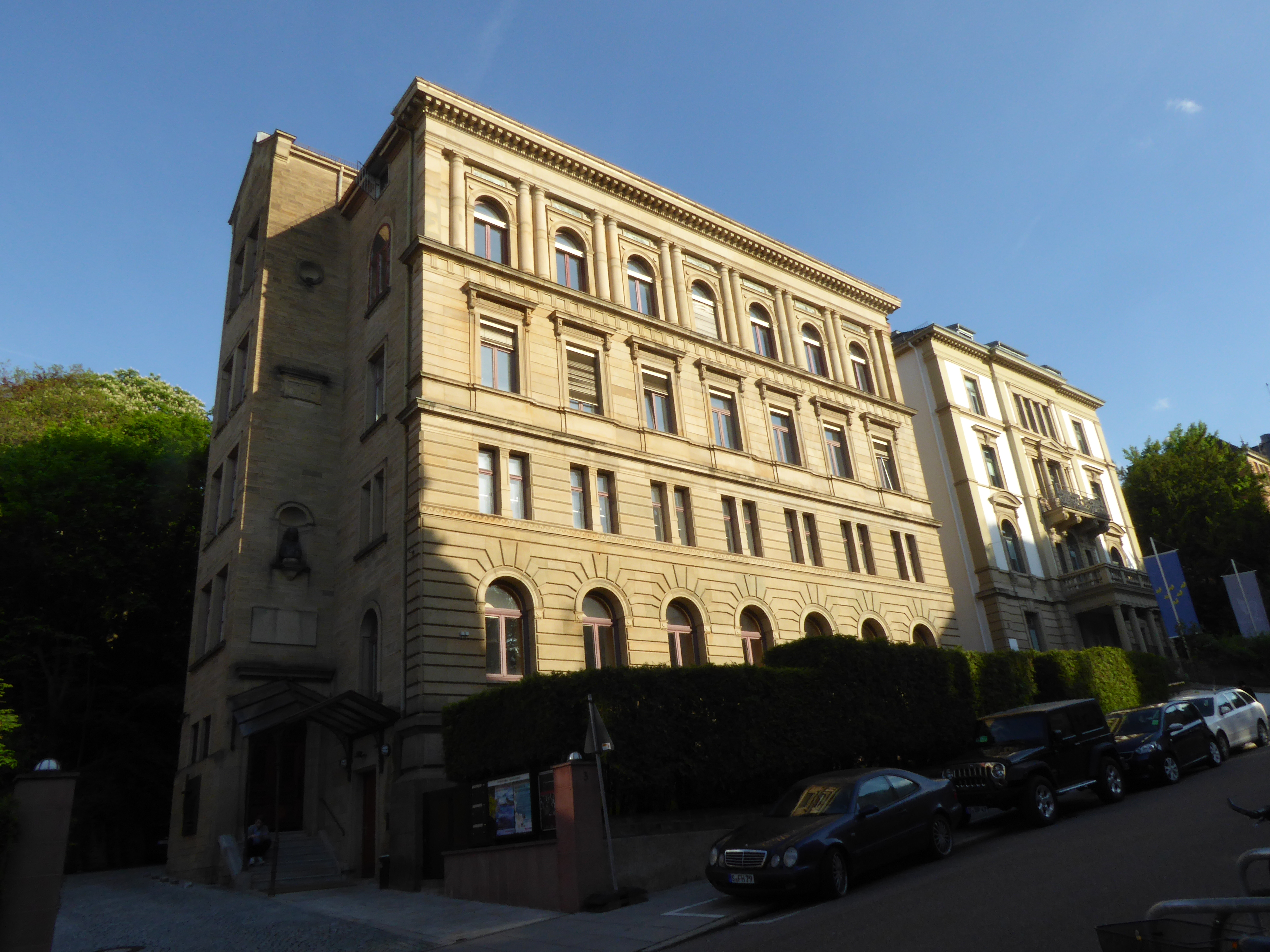 Ehemaliger Enke-Verlag Hasenbergsteige 3, Stuttgart. Erbaut 1878-1879 von Johann Wendelin Braunwald im Stil der italienischen Neorenaissance. Geschützt nach § 2 DSchG.